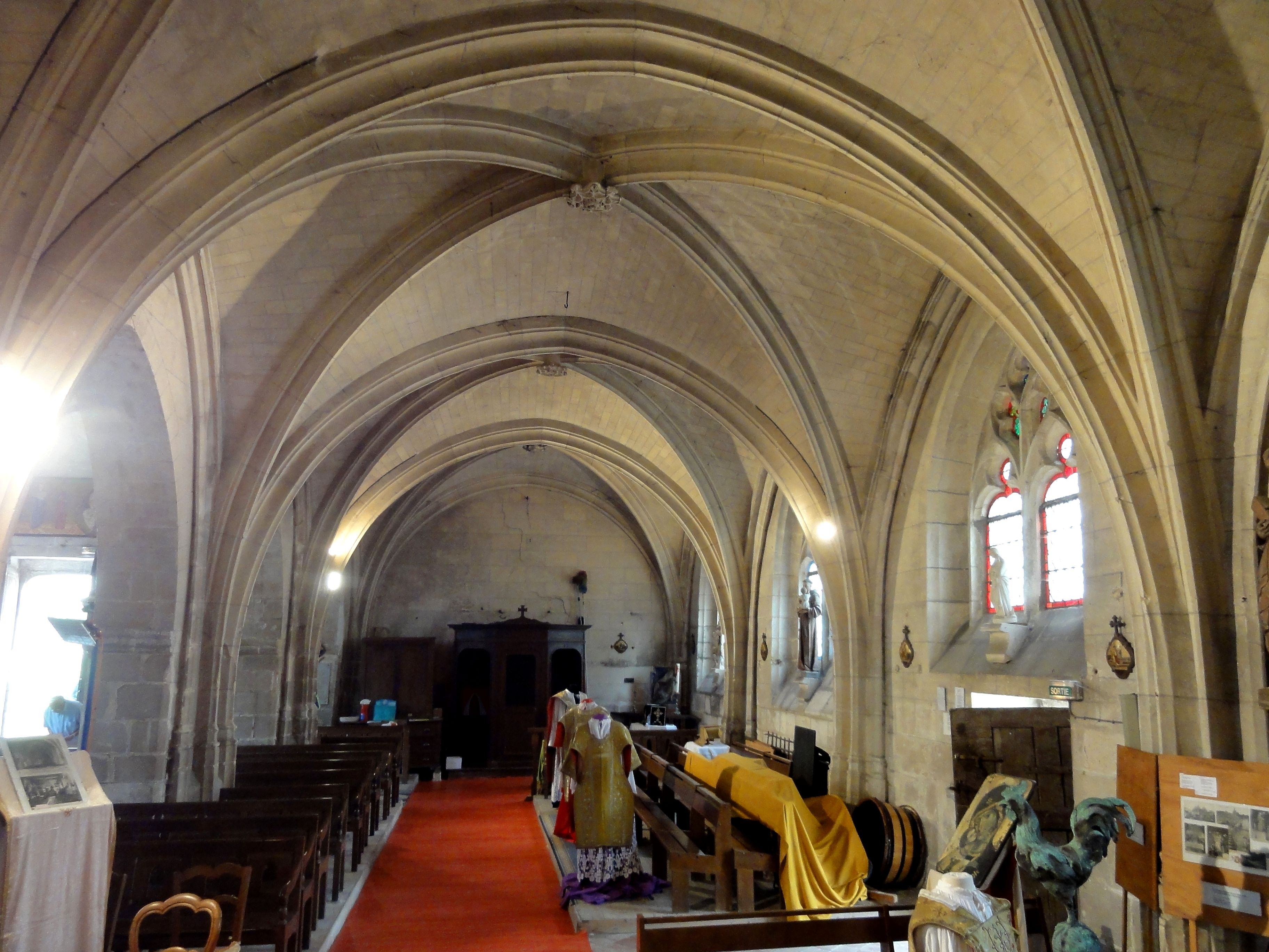 Nef nord, vue vers l'ouest.